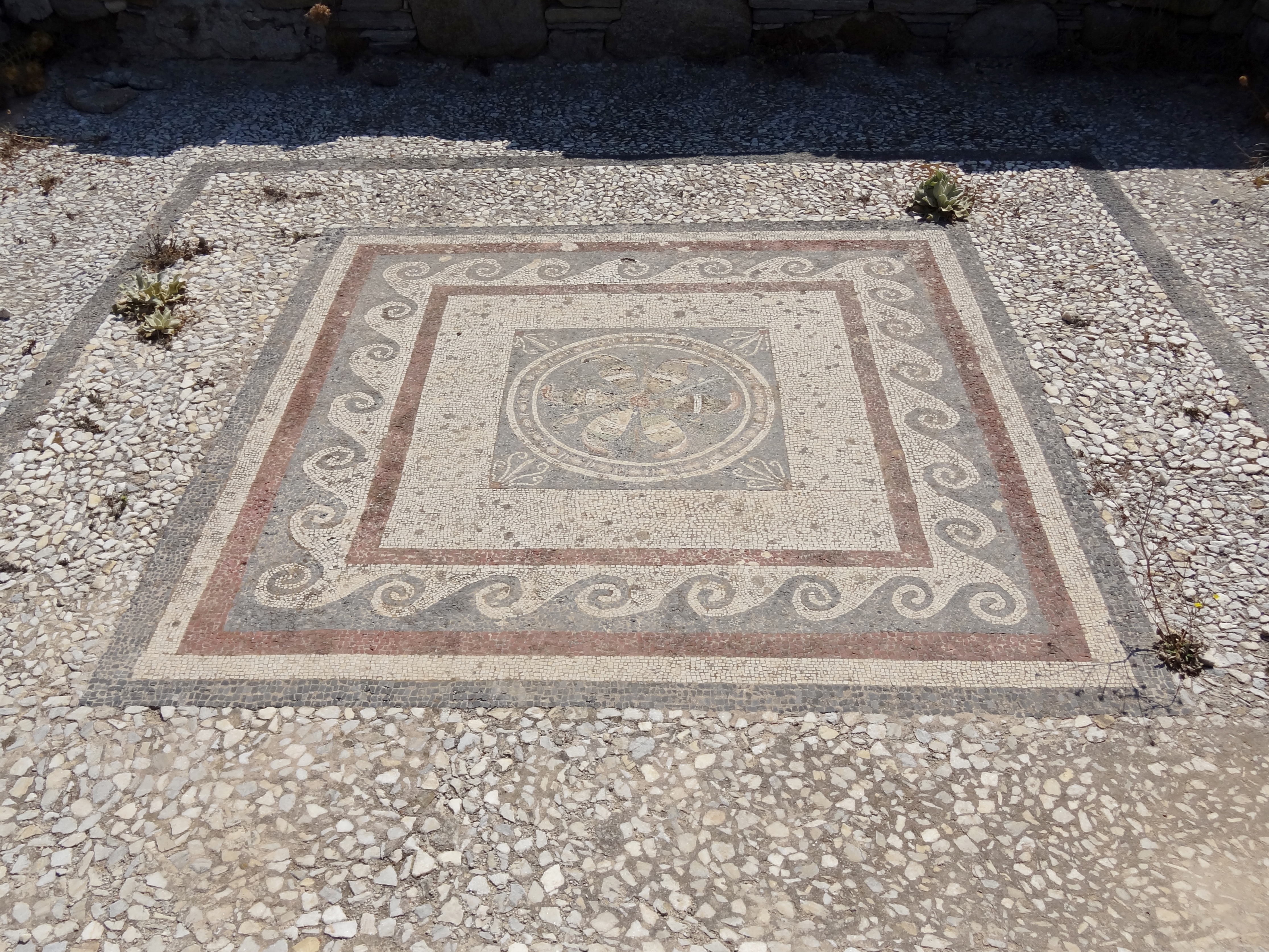 Theaterviertel auf Delos, Kykladen, Griechenland